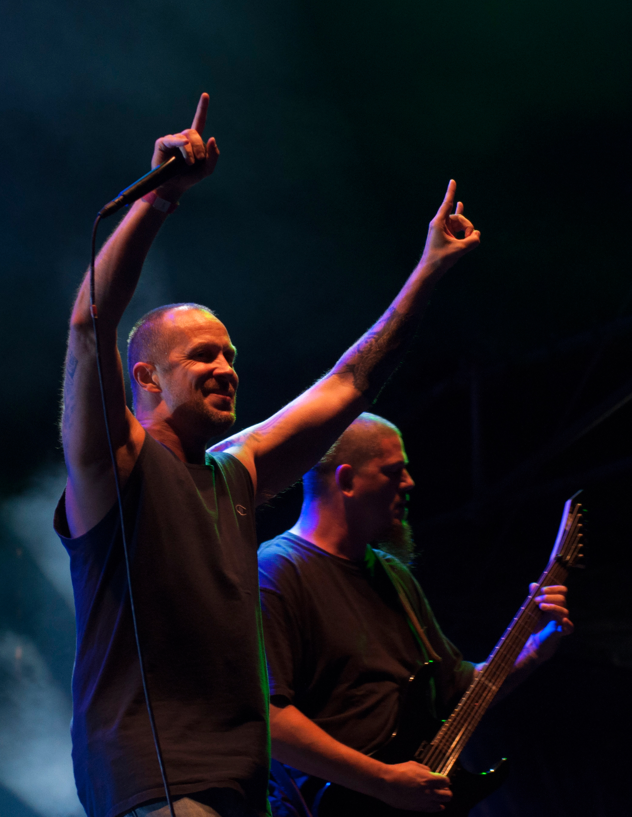 Suffocation at Party.San Open Air 2014